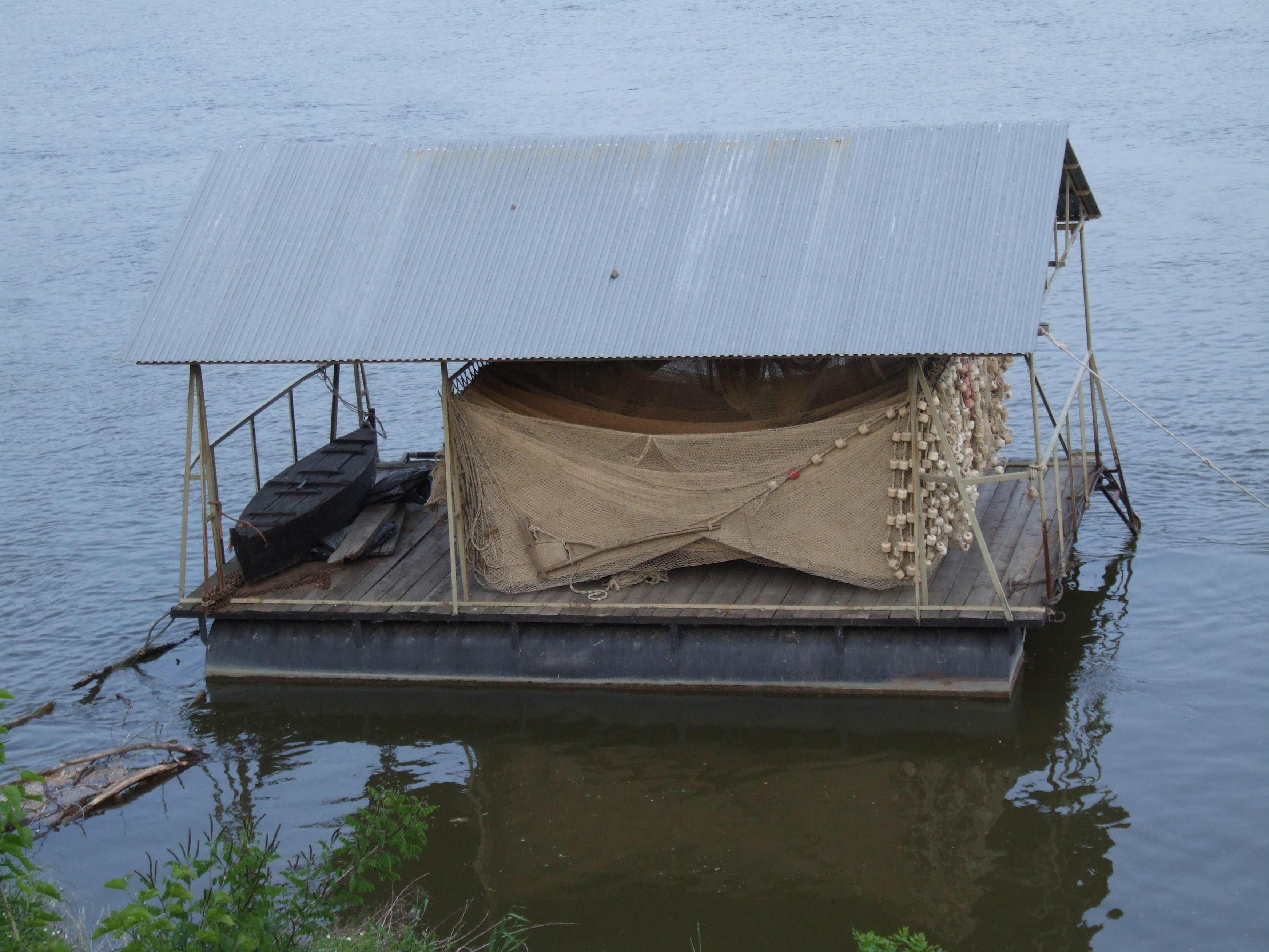 Halászhálók, Paks